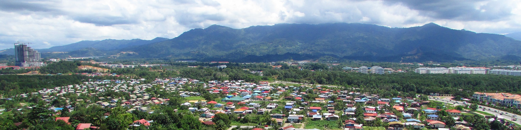 Lawas